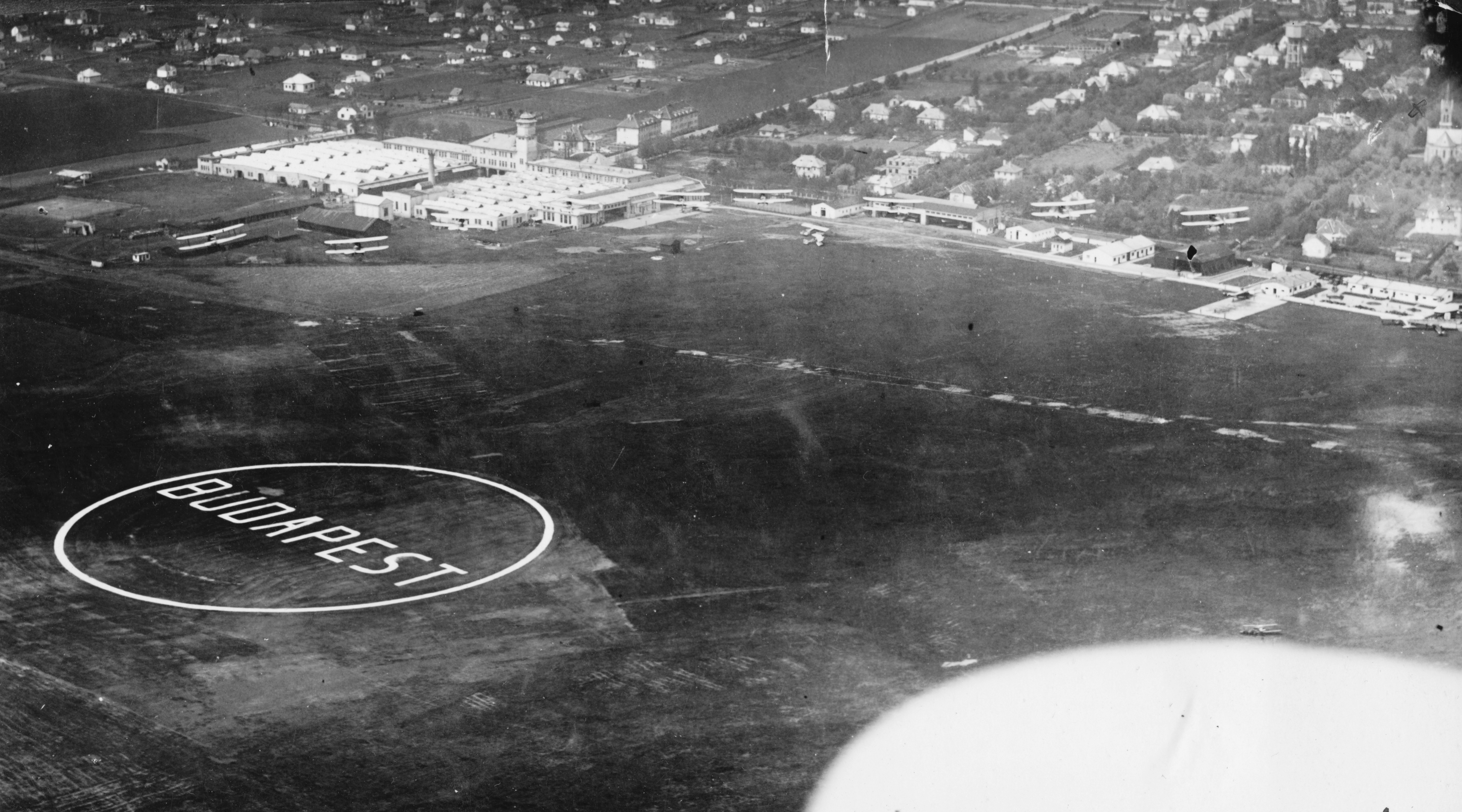 A mátyásföldi repülőtér madártávlatból 1933-ban, Szent-Istvány Dezső pilóta képén